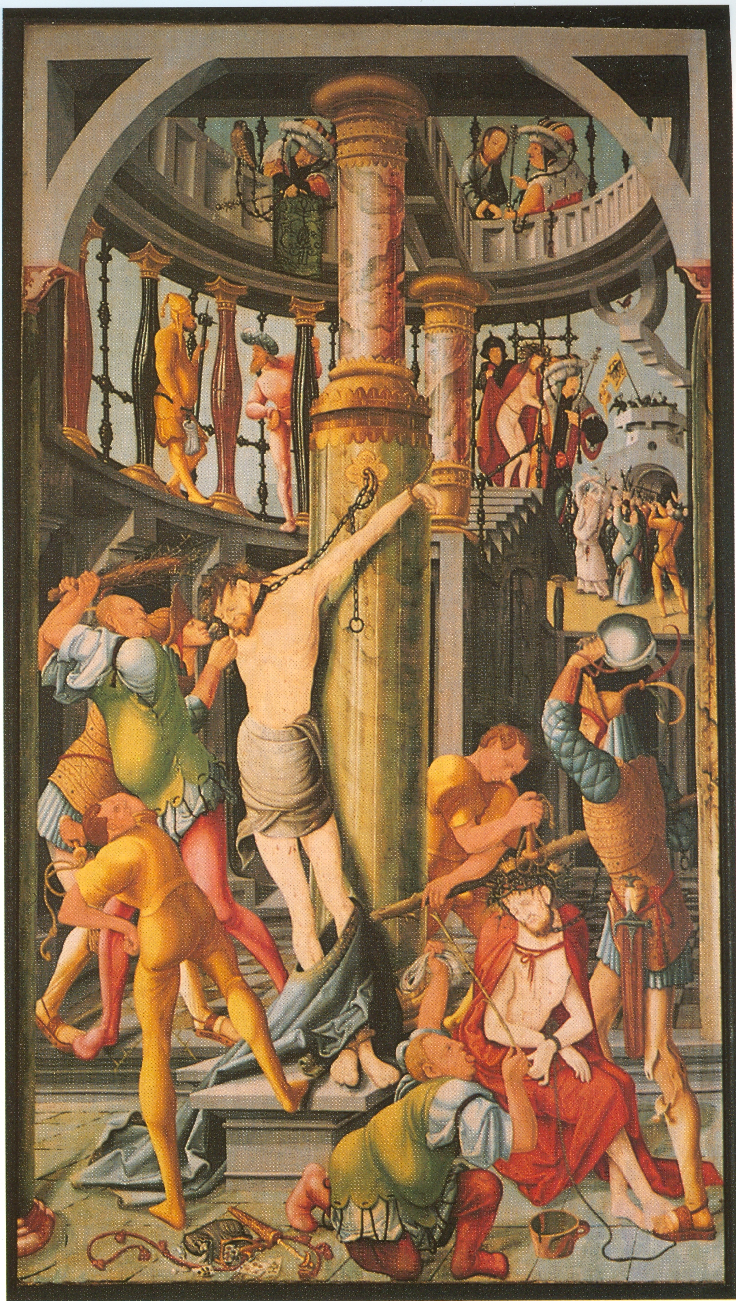 Herrenberger Altar, linke Mitteltafel